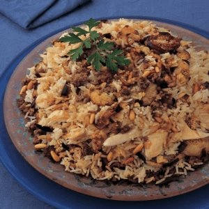 مقلوبة بالدجاج والباذنجان